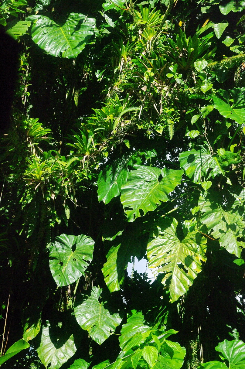 Philodendron im Nationalpark, Guadeloupe